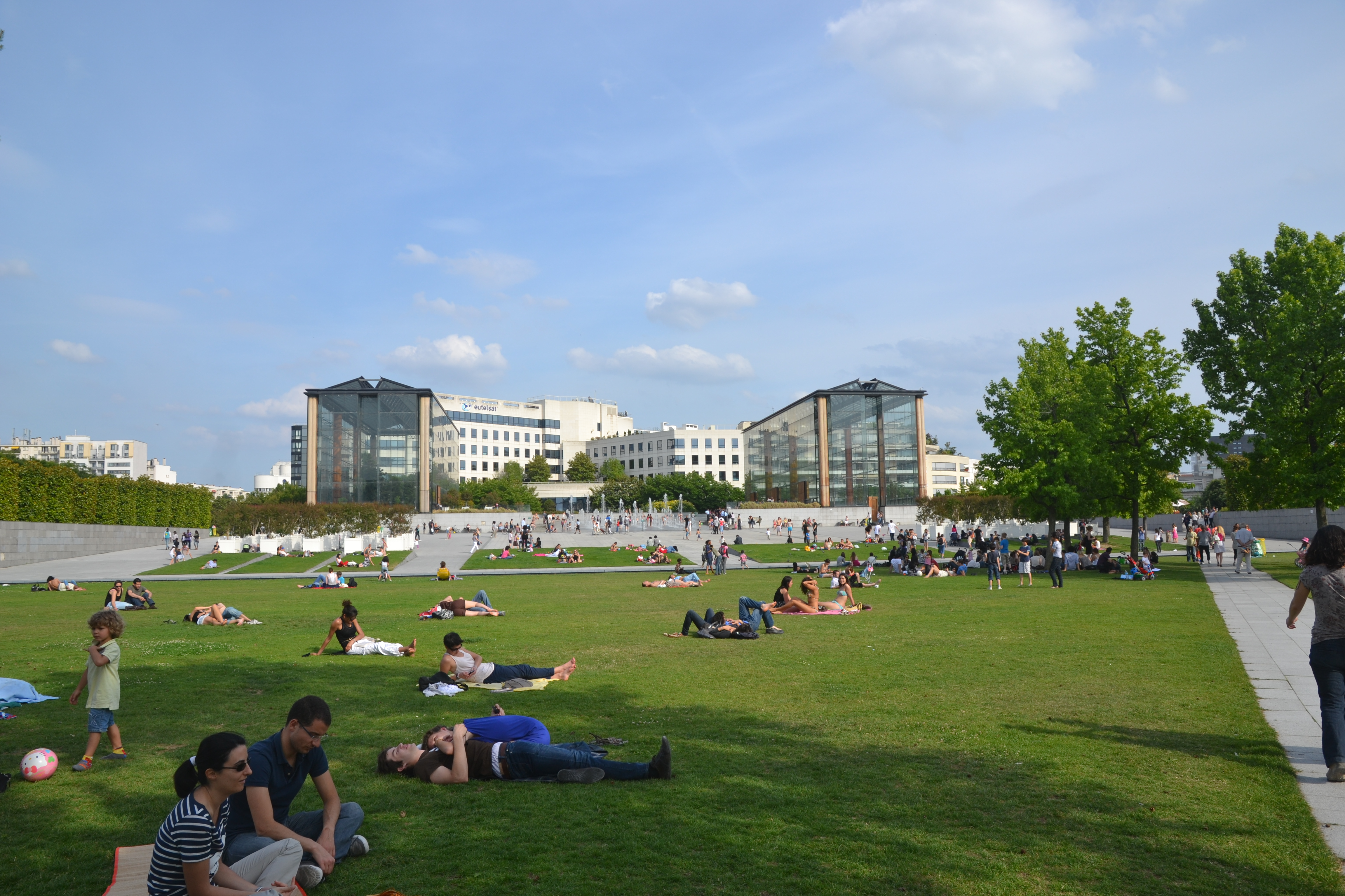 Parc André Citroën, Paris.